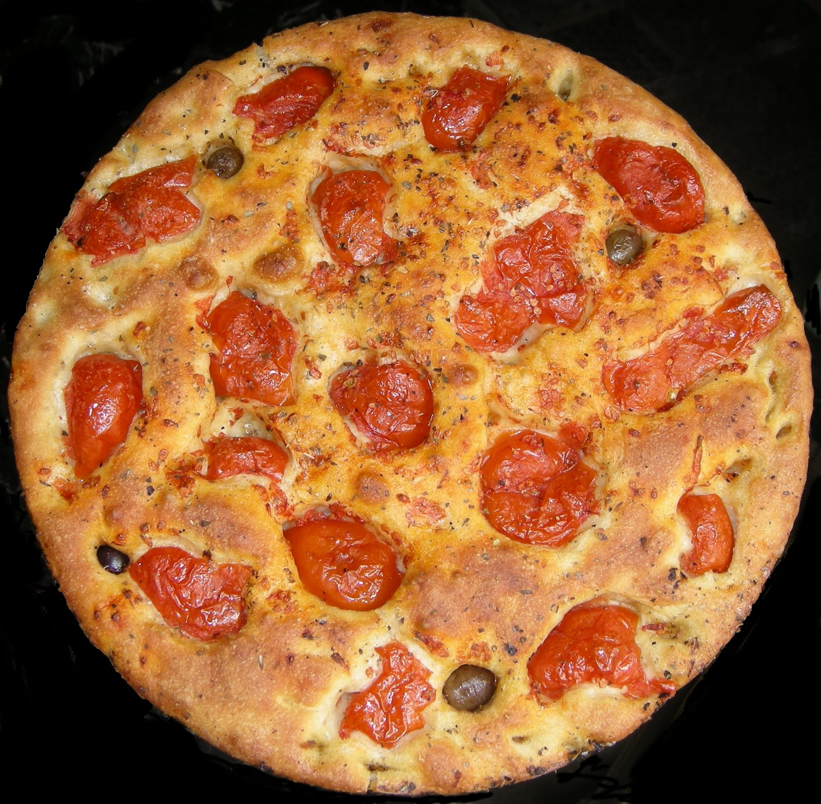 Bari, Italy